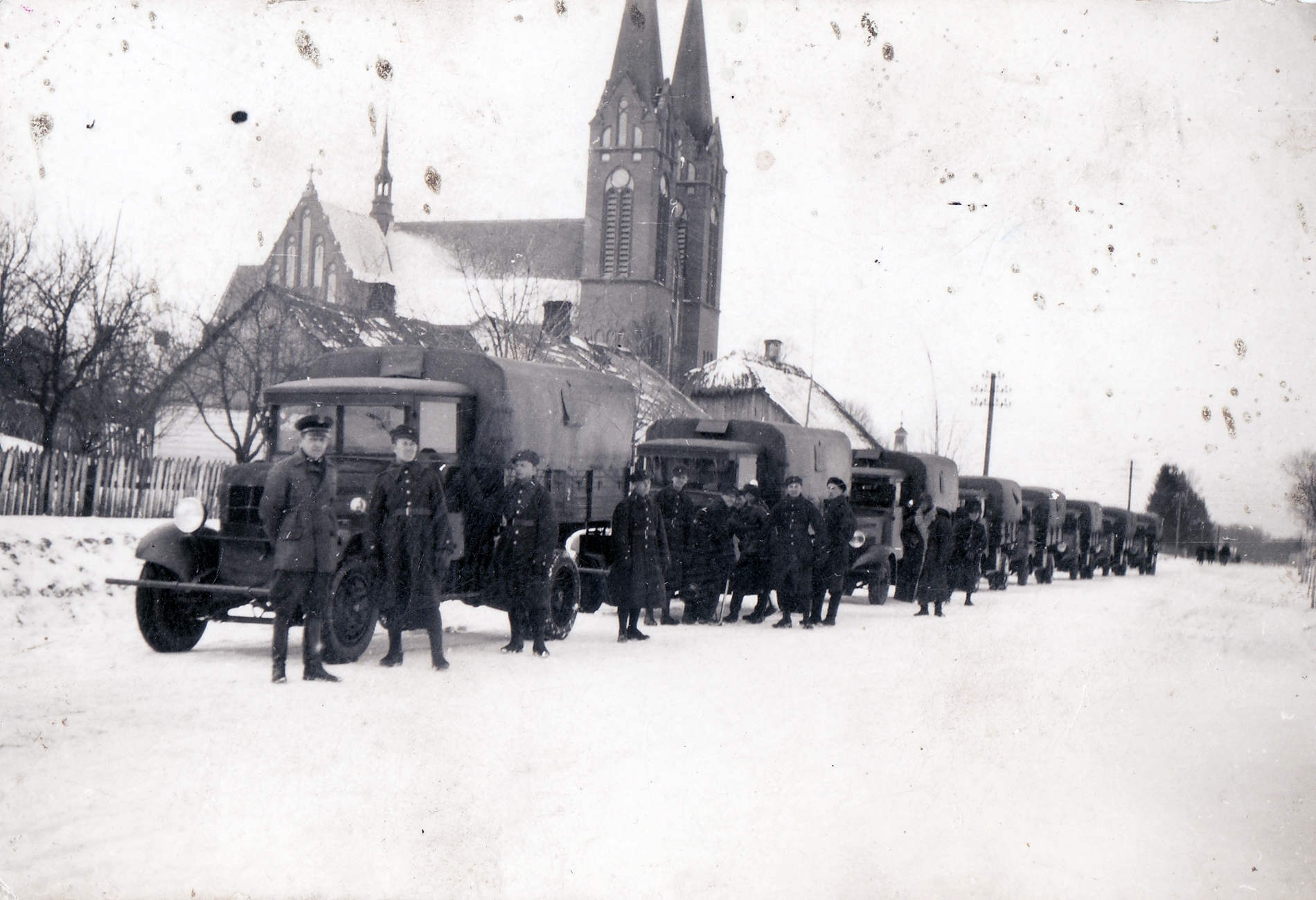 Żołnierze kadry 9 batalionu pancernego.